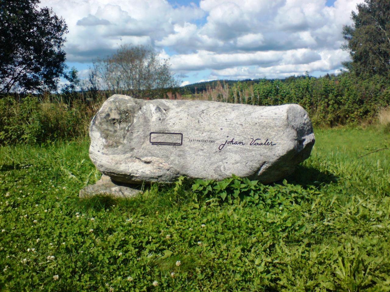 Binderssteinen på Lierfoss i Aurskog-Høland kommune.